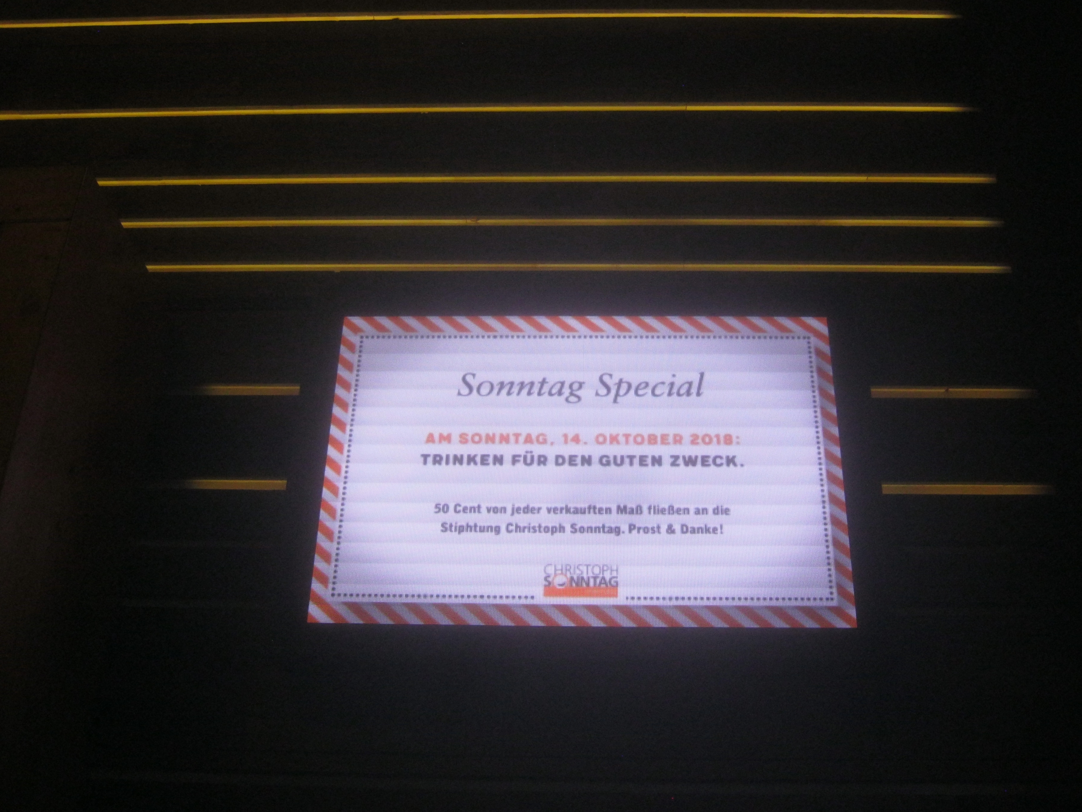 Werbemonitor an der Außenseite des "Göckelesmeier"-Festzeltes. Man beachte den Rechtschreibfehler (Stiphtung statt Stiftung)!